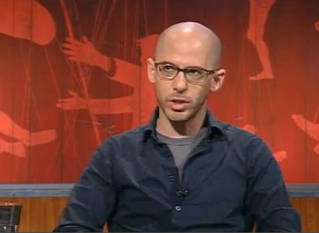 מולי שגב הוא מפיק ותסריטאי ישראלי. בתוכנית הראיונות "המושכים בחוטים" בטלוויזיה הלימודית